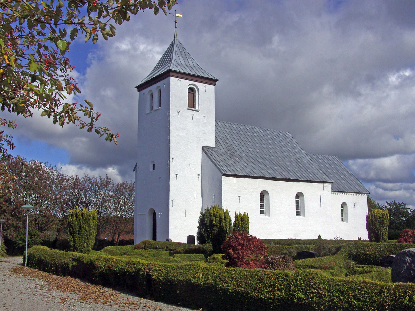 fra sydvest